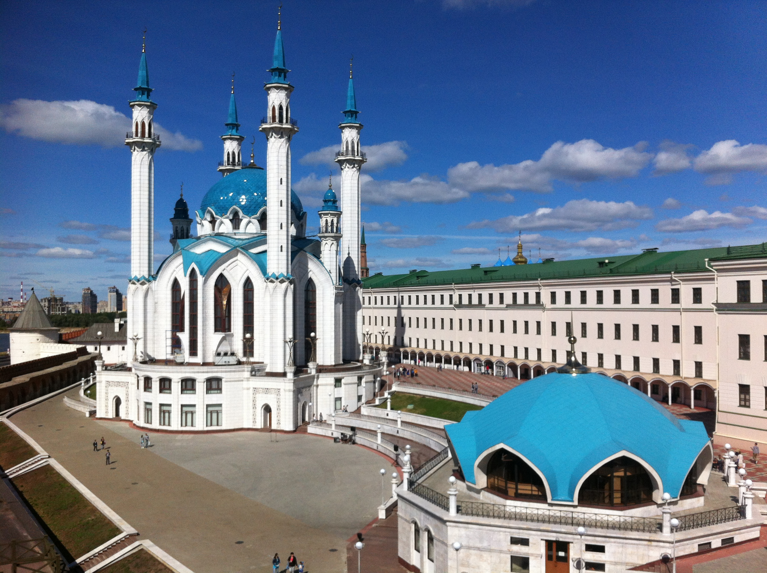 Ансамбль Казанского Кремля (Государственный историко-архитектурный и художественный музей-заповедник Казанский Кремль): Кремль, Казань, Татарстан